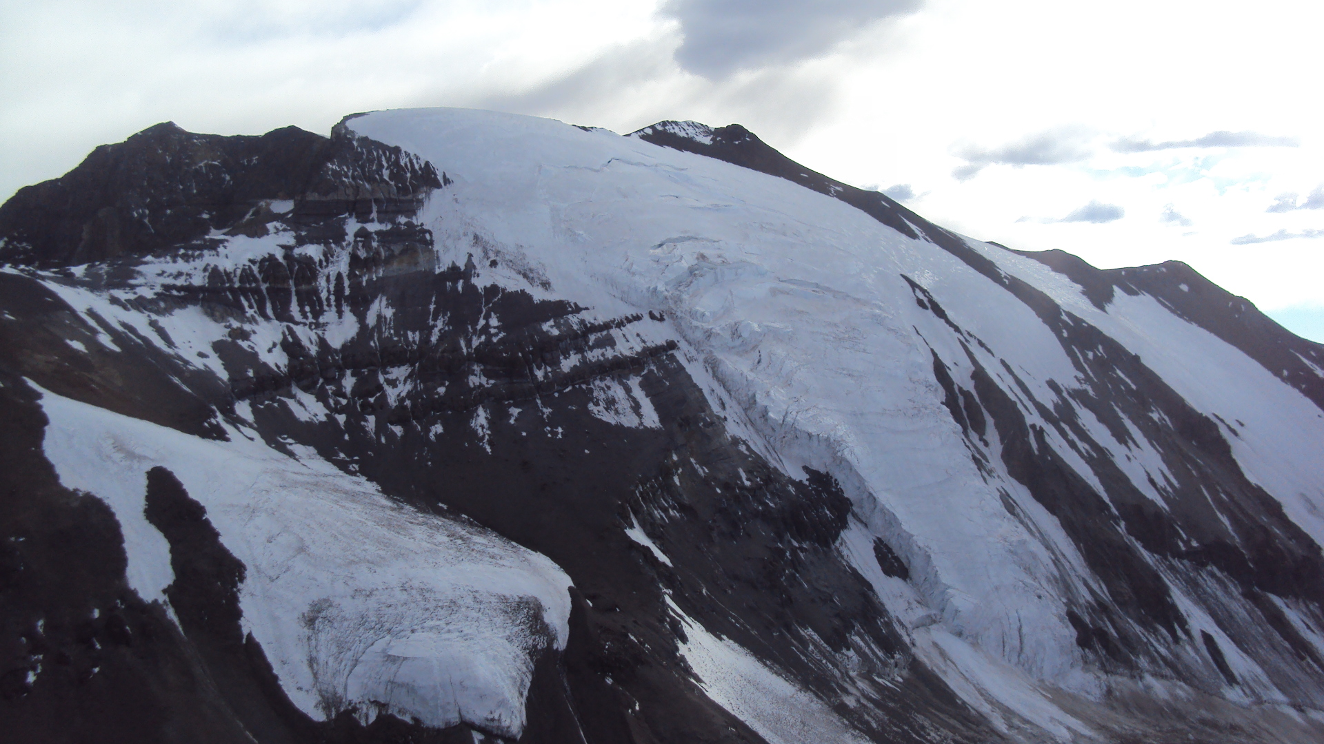 Foto tomada desde la cumbre del Cerro Leonera a 5050 msnm hacia el Noroeste. Por lo tanto podemos apreciar la cara Sureste del Cerro Plomo (5424 msnm); el Glaciar Iver: escalable.